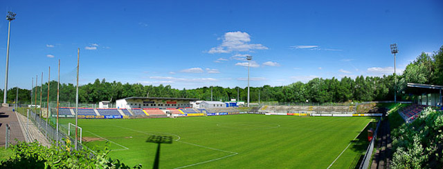 Panorama Waldstadion an der Kaiserlinde Elversberg - Sicht vom Presseraum